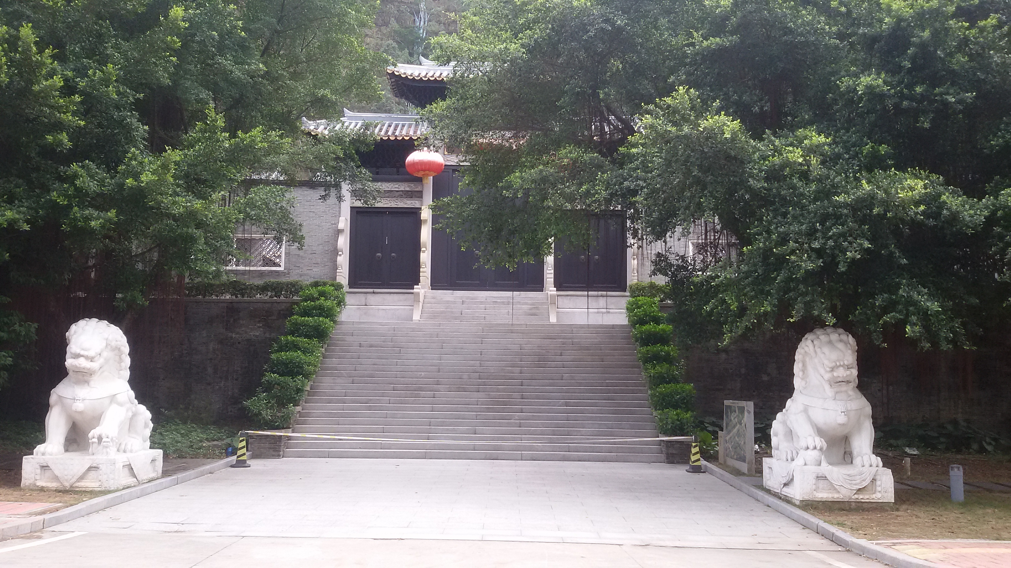 粵語: 霍英東紀念館